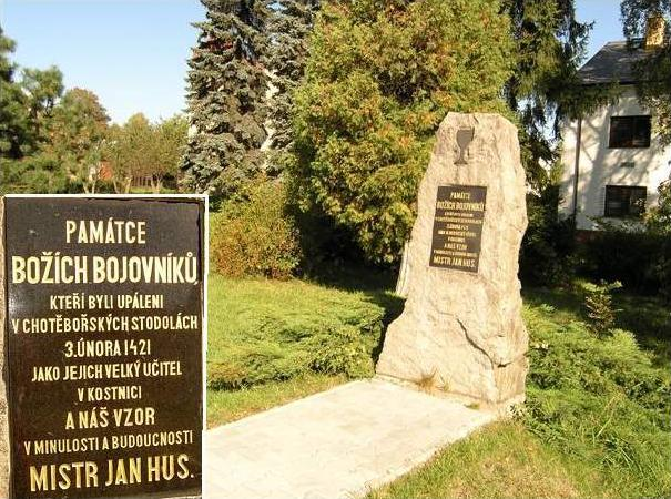 Památník upální husitů roce 1421 v Chotěboři